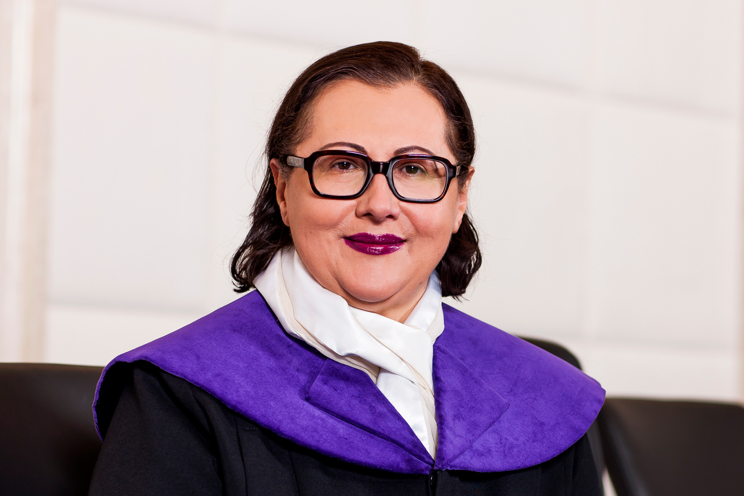 Dr. Lilian Hofmeister, Ersatzmitglied des österreichischen Verfassungsgerichtshofs seit 1998.